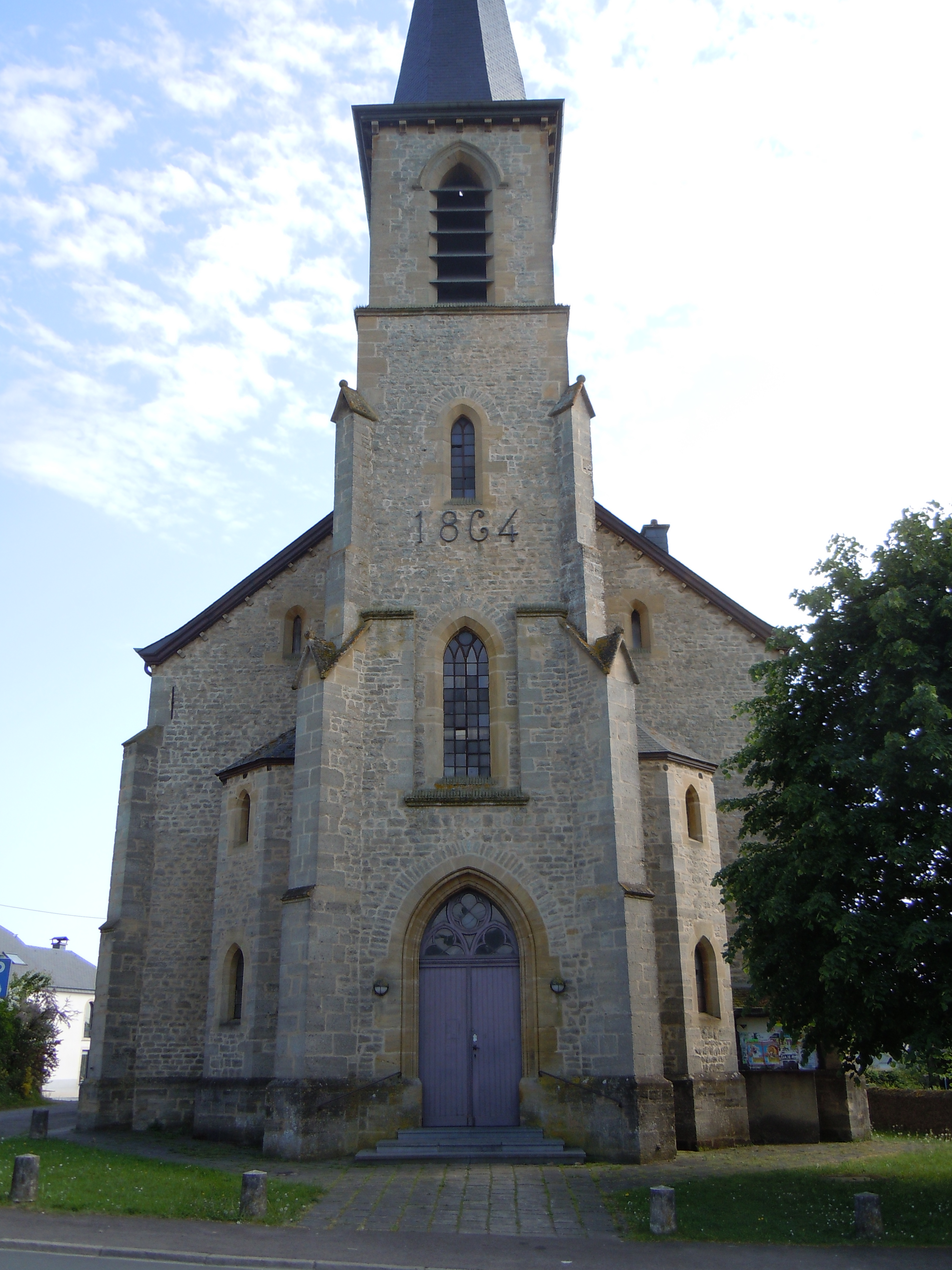 L'église Saint-Willibrord d'Autelbas-Barnich (Belgique) vue du nord